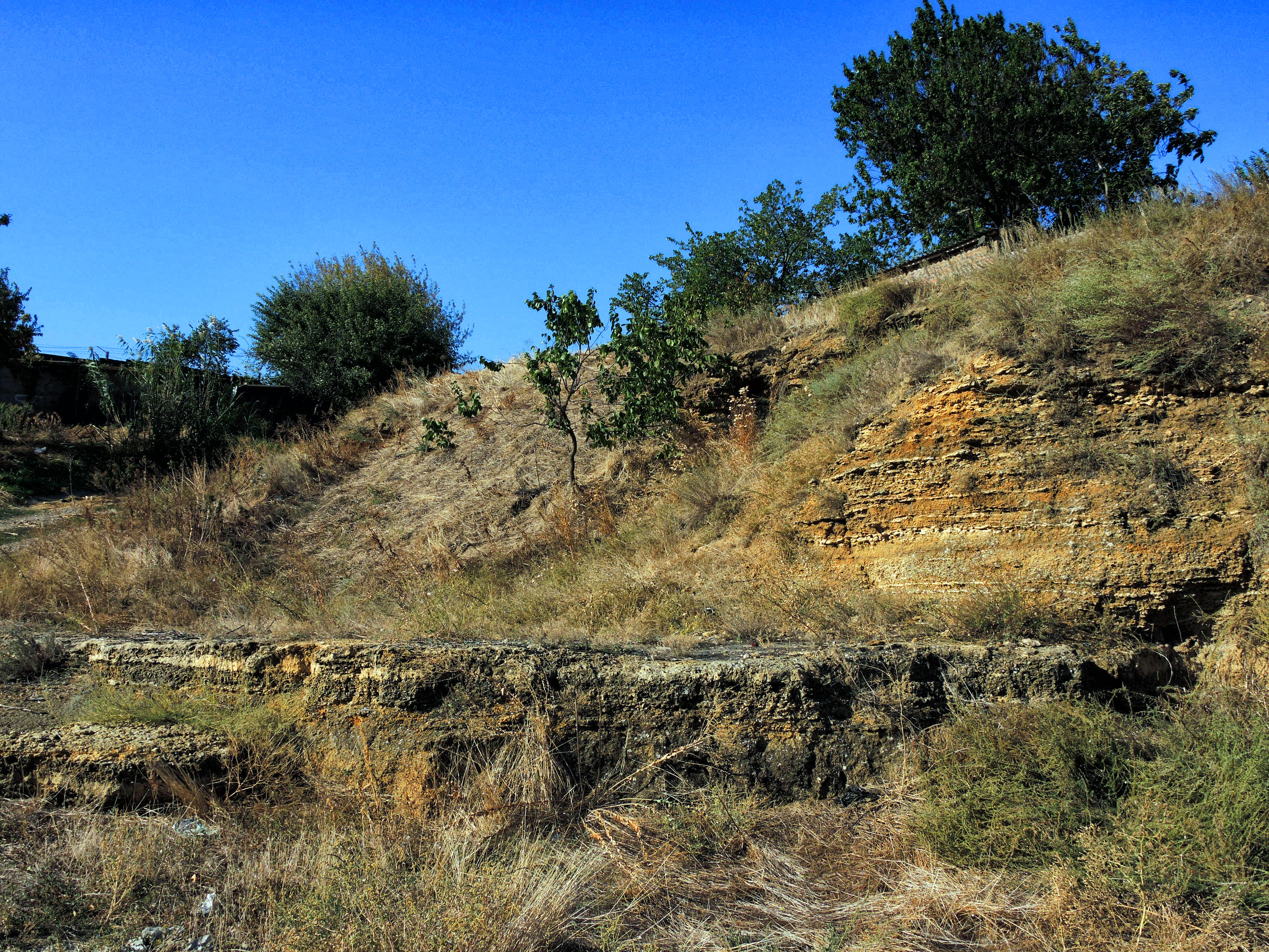 Кобяково городище: Аксайская, Аксайский район, Ростовская область